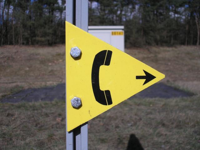 Onderbordje aan hectometerpaal dat looprichting naar dichstbijzijnde praatpaal aangeeft (praatpaalwijzer?). Fotowerk volledig vrijgegeven voor gebruik in het publieke domein door fotograaf (pudding). De ontwerper van het bordje heeft mogelijk auteursrecht op het ontwerp hiervan, maar zolang het bordje wordt weergegeven zoals het langs de openbare weg gefotografeerd is zou de foto onbeperkt hergebruikt mogen worden. Uitlichten van het bordje alleen uit de achtergrond is mogelijk strafbaar.